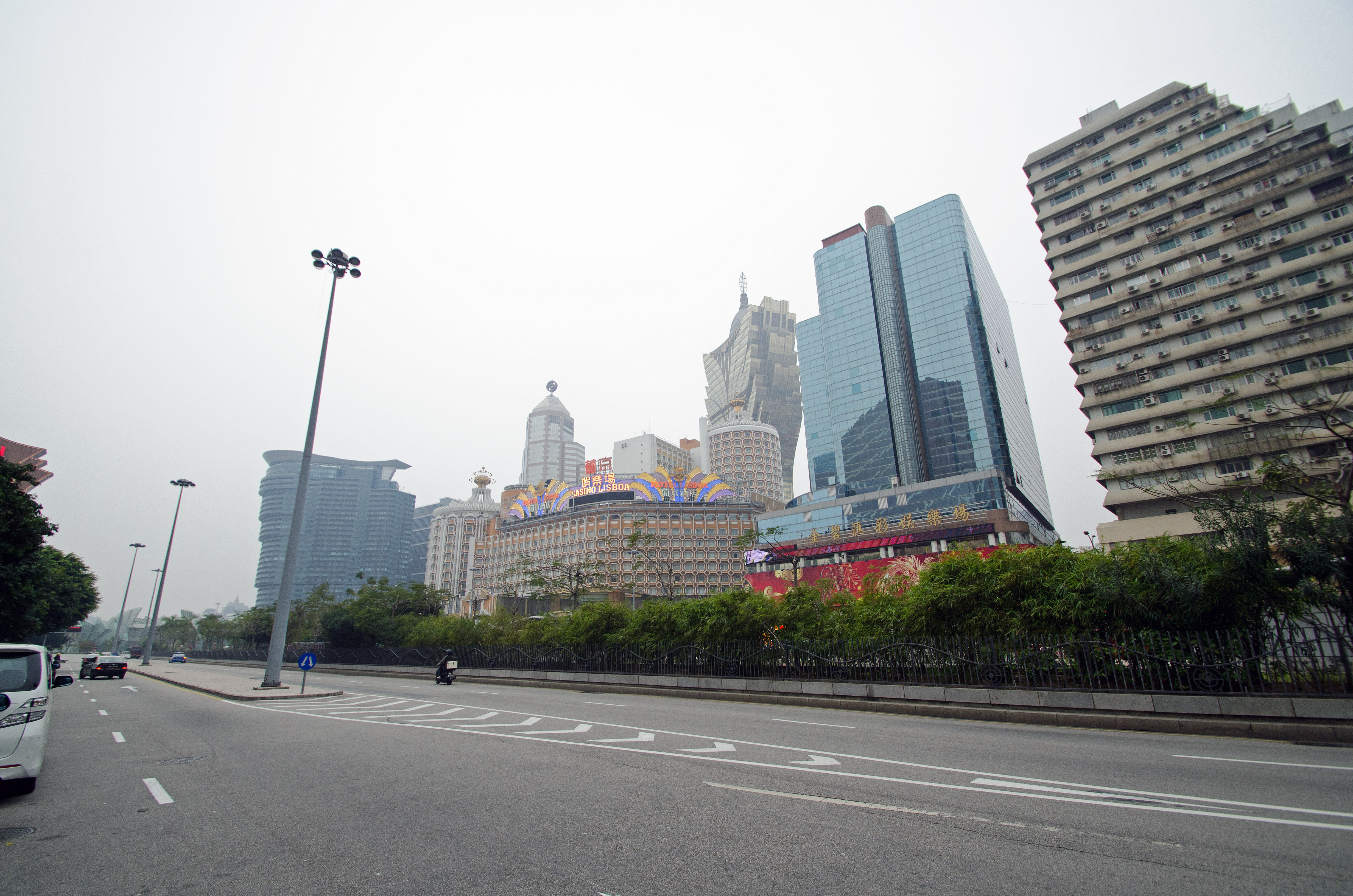 Wynn Macau